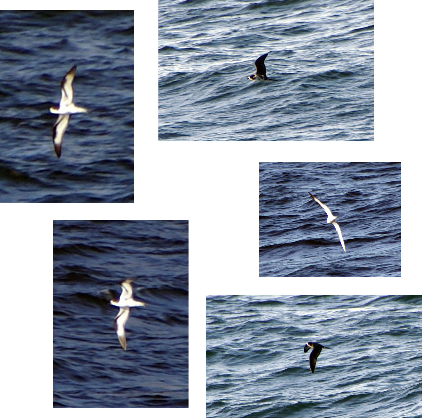 Galápagos Petrel (Pterodroma phaeopygia)